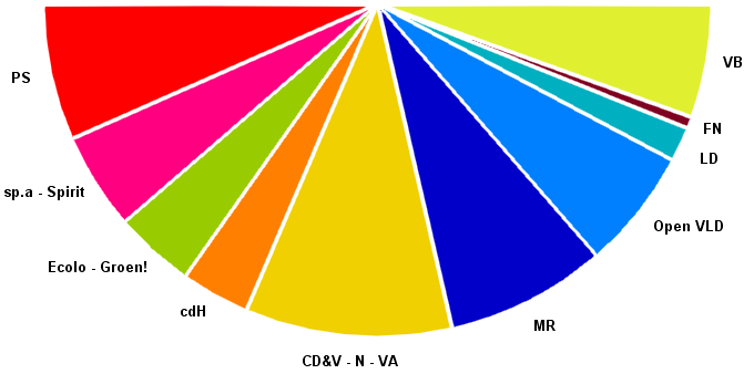 Projection graphique de la composition de la Chambre belge suites aux élections législatives fédérales de 2007.